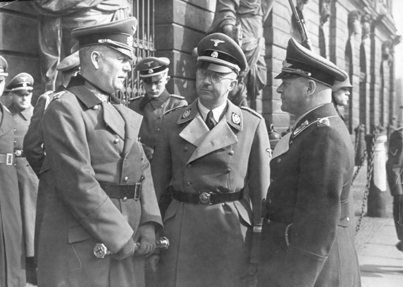 Heldengedenktag am 14.3.1942 in Berlin Generalfeldmarschall Keitel, Reichsführer SS Himmler und Generalfeldmarschall Milch vor dem Zeughaus in Erwartung Adolf Hitlers.